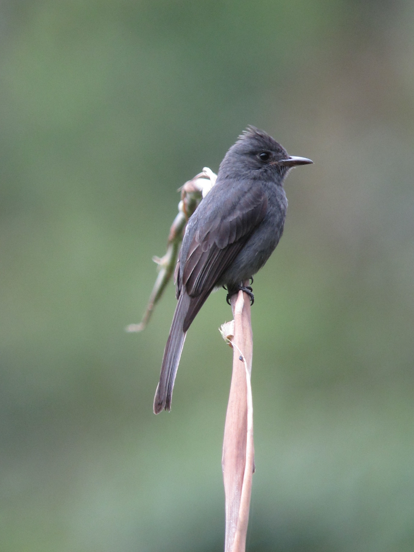 Jardín, Antioquia, Colombia